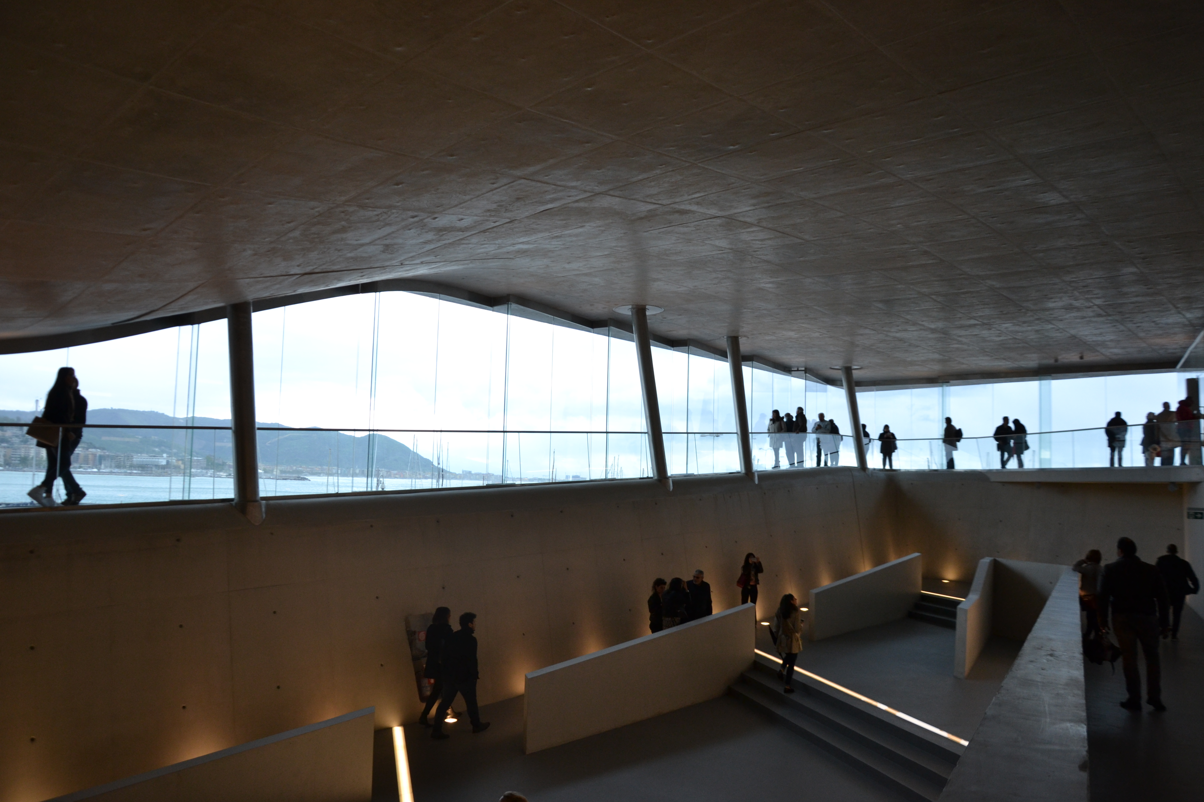 Interno stazione marittima di ZAHA HADID a Salerno